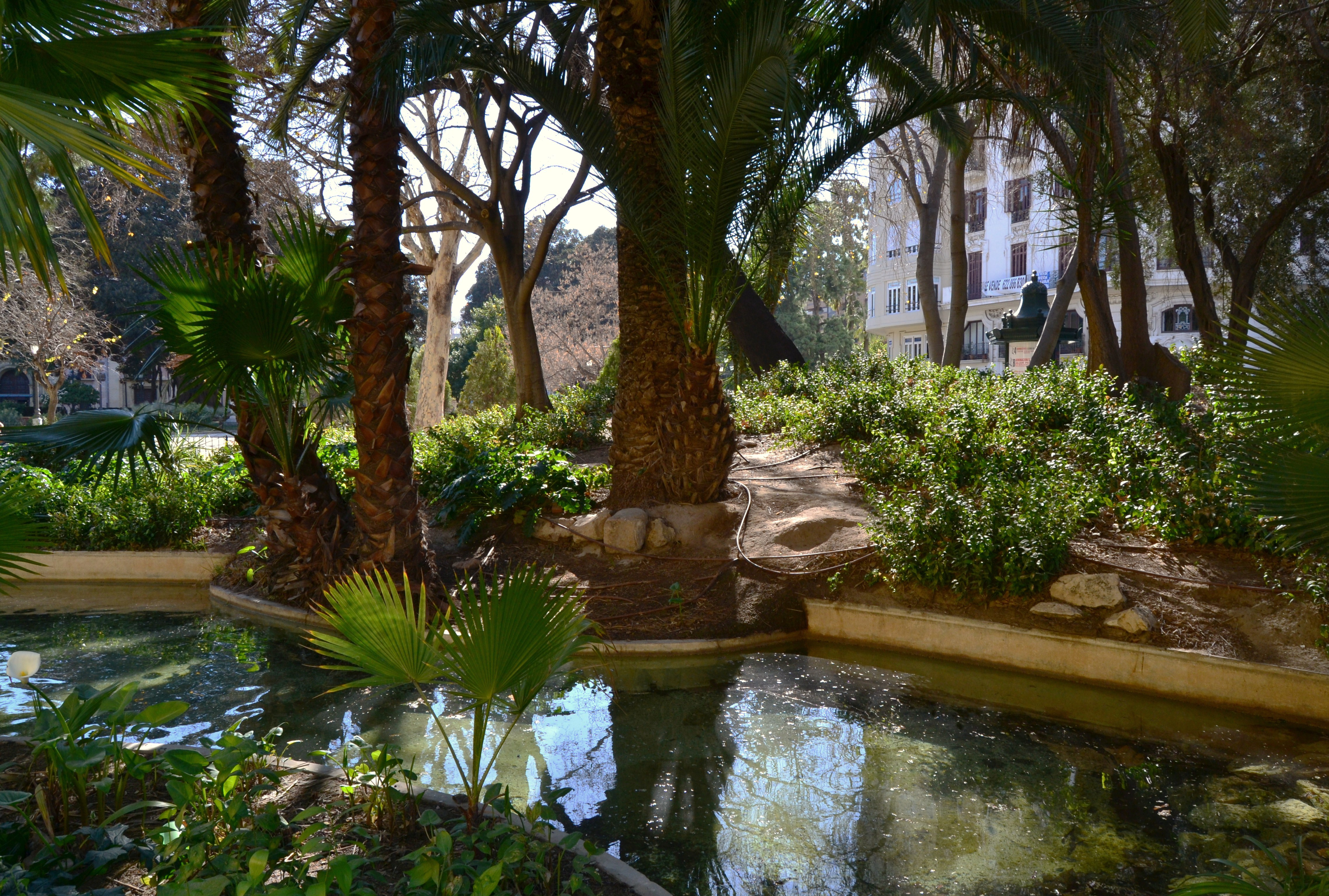 Jardins de la Glorieta de València, estany.